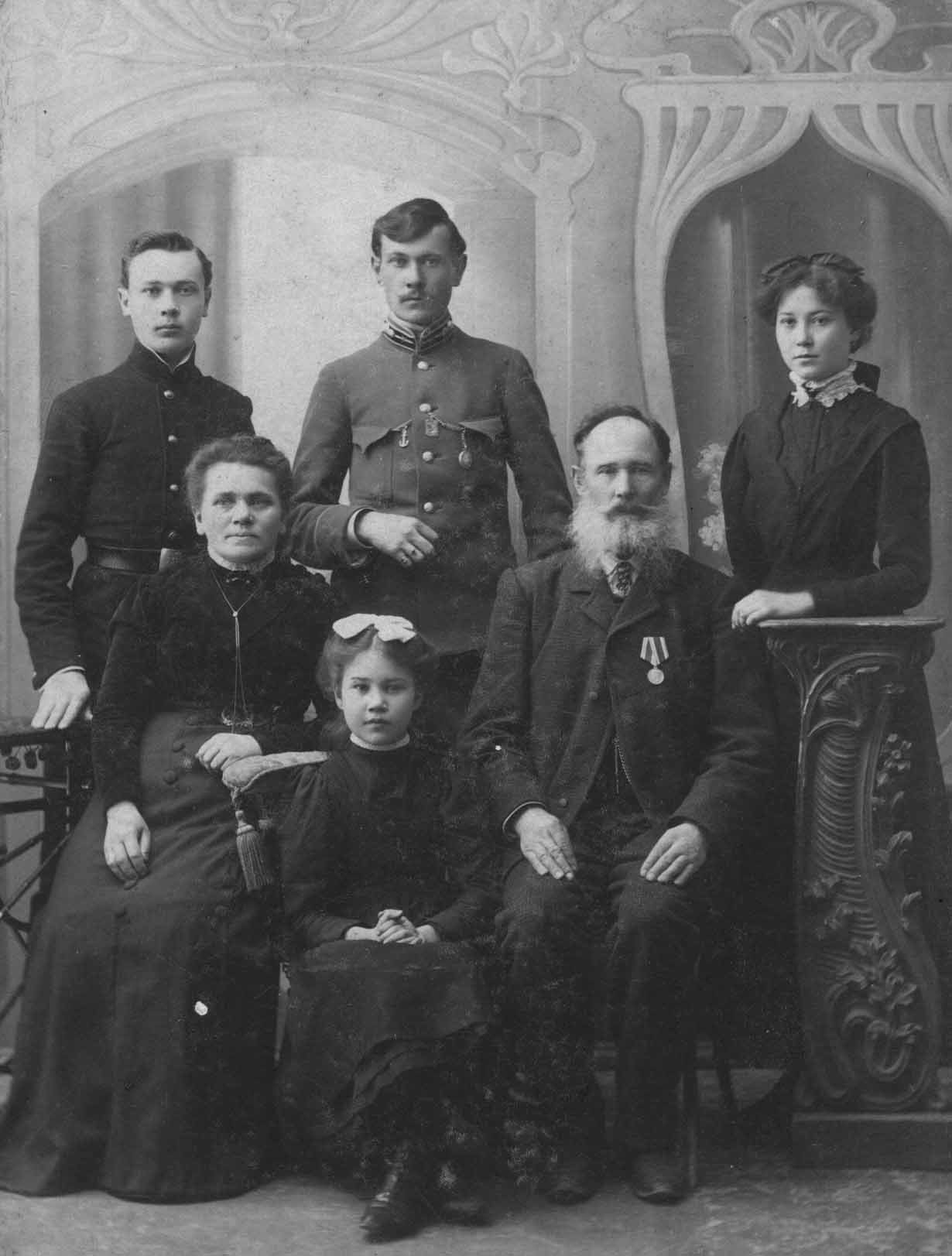 Александр Лейбург с семьёй (сверху слева), г. Симферополь, приблизительно 1910 г.